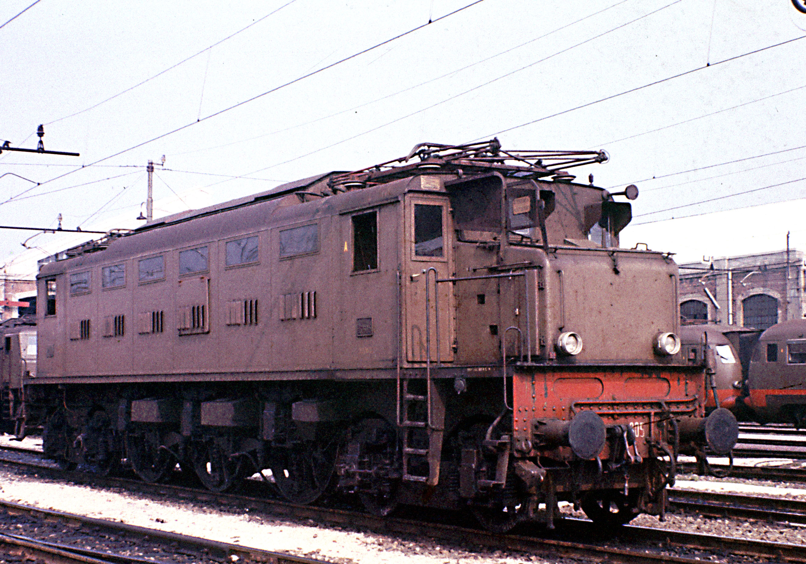 Foto scattata da Sandro Baldi di Bologna. Deposito Locomotive di Bologna Centrale - Anno 1980 circa - Inserita da Utente:Horatius Il locomotore E.326.005 che appare nella foto è uno dei dodici esemplari costruiti.